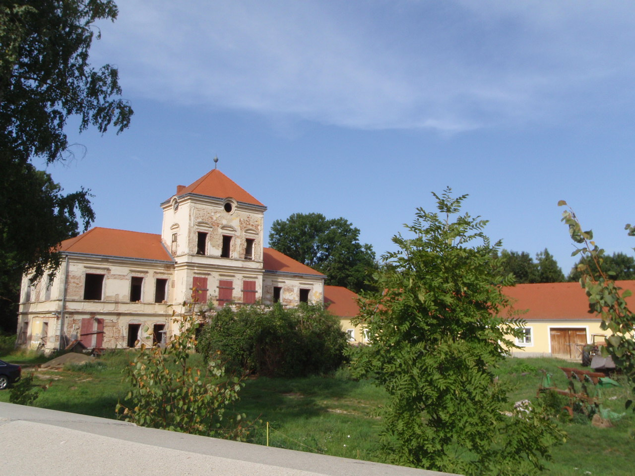 Csehimindszent Mesterházy kastély 2015-ben